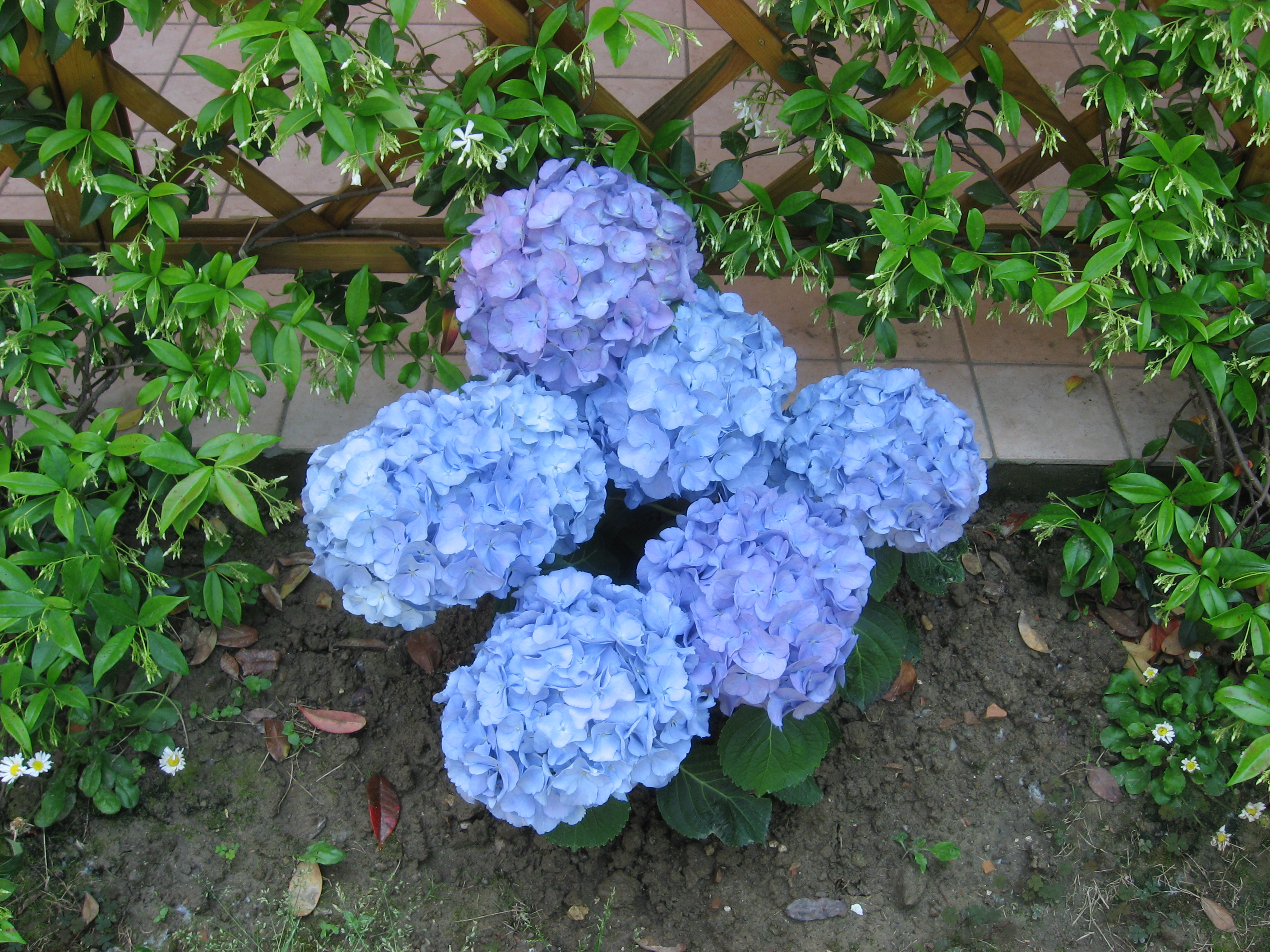 Hydrangea Cultivar: Inflorescences